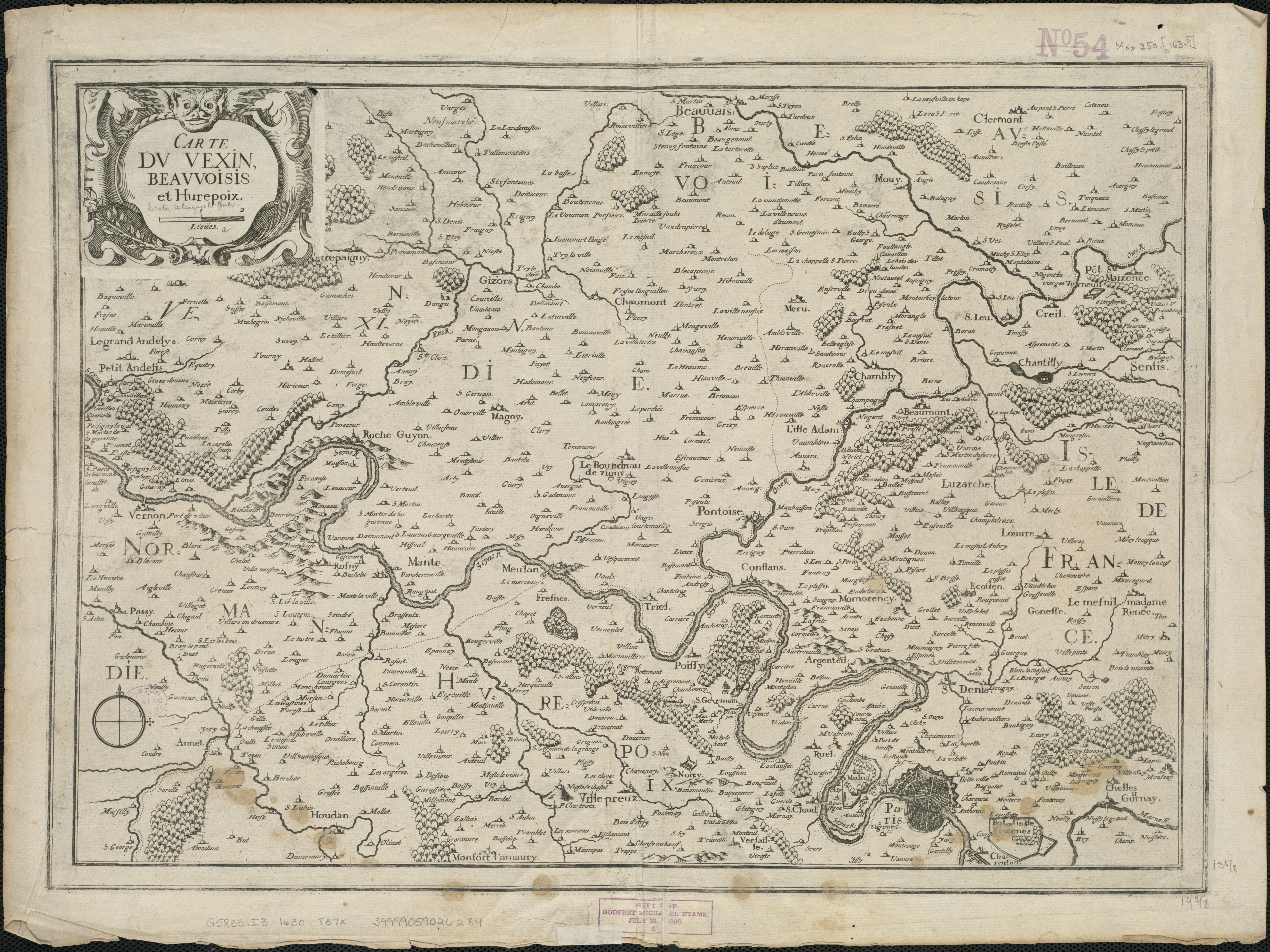 Carte du Vexin, Beauvoisis, et Hurepoix (France) ; 35cm x 49cm ; 1:240,000